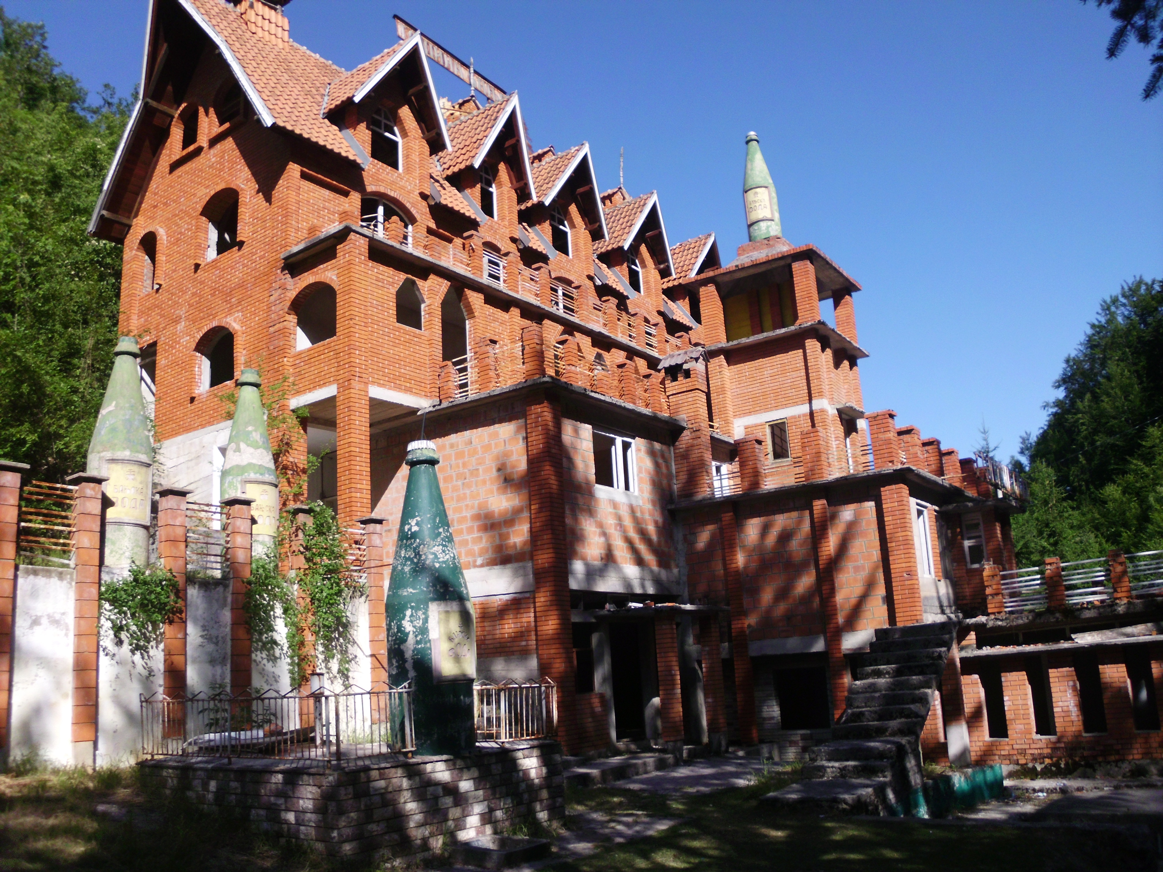 Tošina banja je bivši motel koji je radio.Tu izvire lekovita voda i ima napravljen bazen za kupanje.Pošto je jedan od vlasnika preminuo ova banja je zapuštena i ideje koje su nekada bile planirane nisu ostvarene.